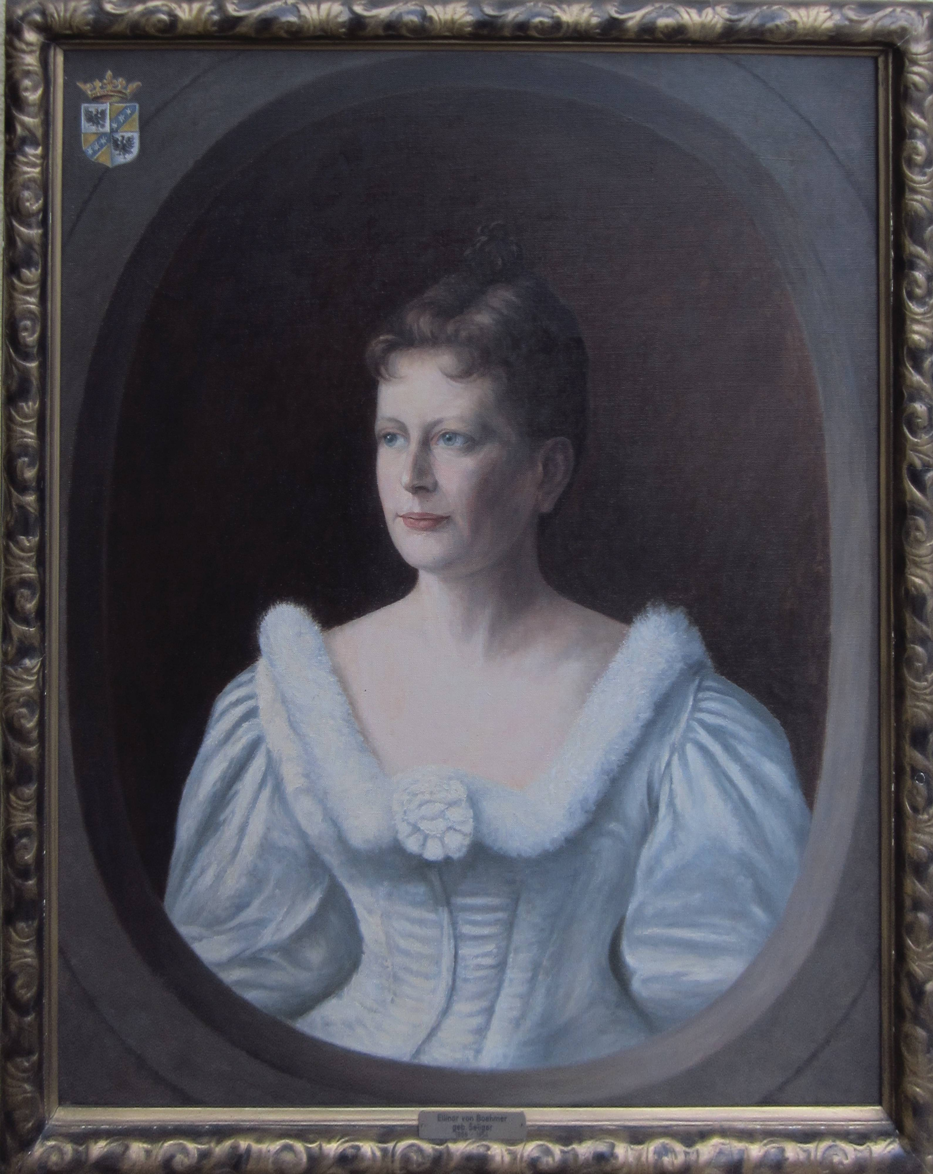 Boehmer von Ellinor geb Seliger (1868–1954), 1893 geschaffenes Öl- oder Pastellbild anlässlich der Heirat mit Hugo Erich von Boehmer. Durch Marie Luise Ottilie von der Osten (* 25. Dez. 1856, † nach 1932) hiervon 1931 angefertigte originalgetreue Kopie in Öl auf Leinwand. Hiervon 2014 erstellte fotomechanische Reproduktion